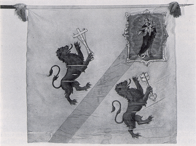 Die alte Fahne der Landvogtei Gaster, um 1770. Historisches Museum St. Gallen.